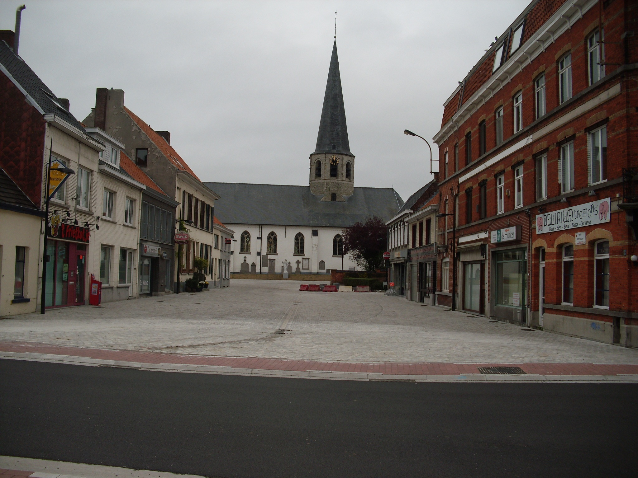 Dorp van Ursel na de renovatie van 2010 - Knesselare - Oost-Vlaanderen - Vlaanderen - België